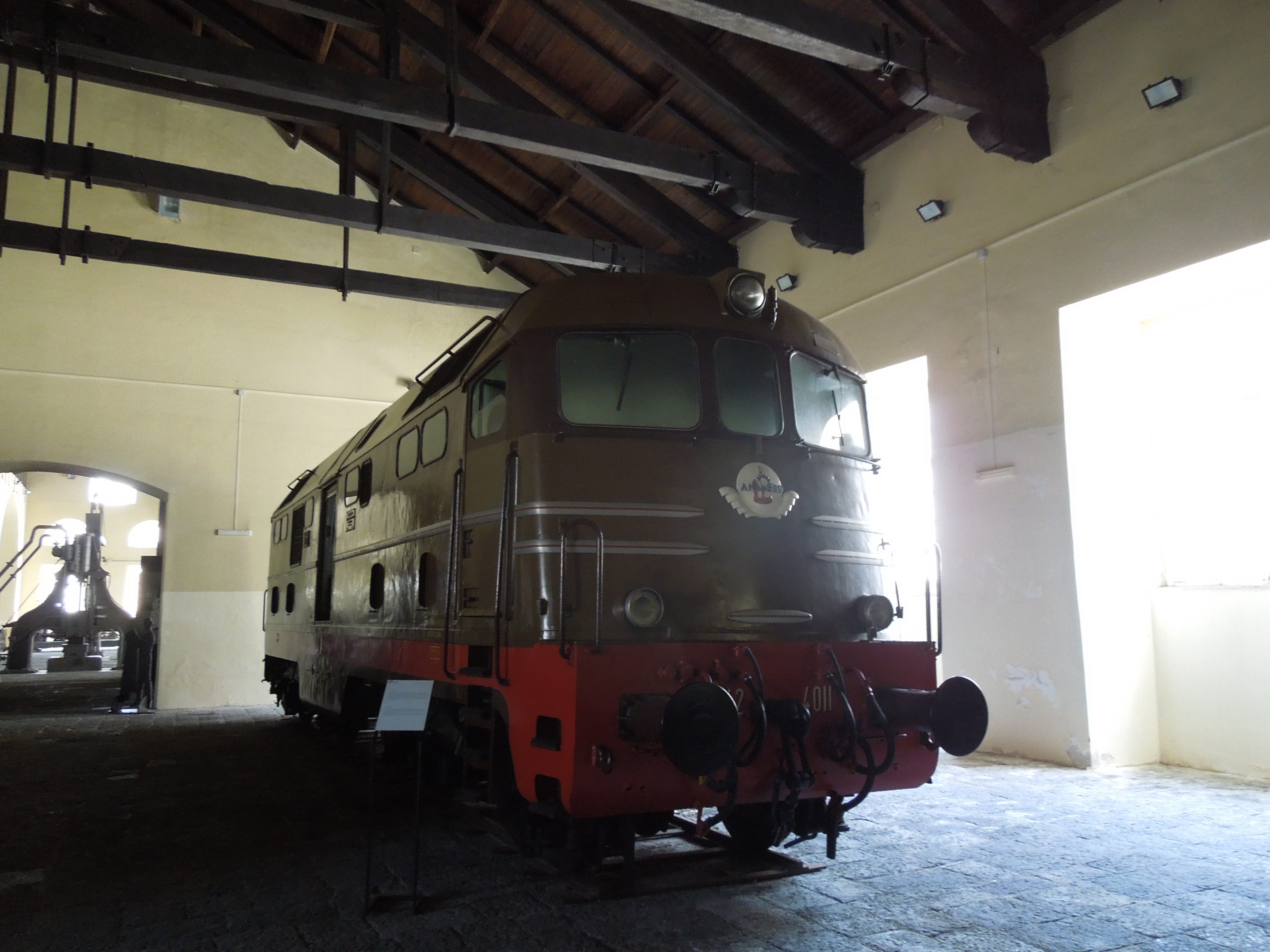 A Pietrarsa vasúttörténeti múzeum